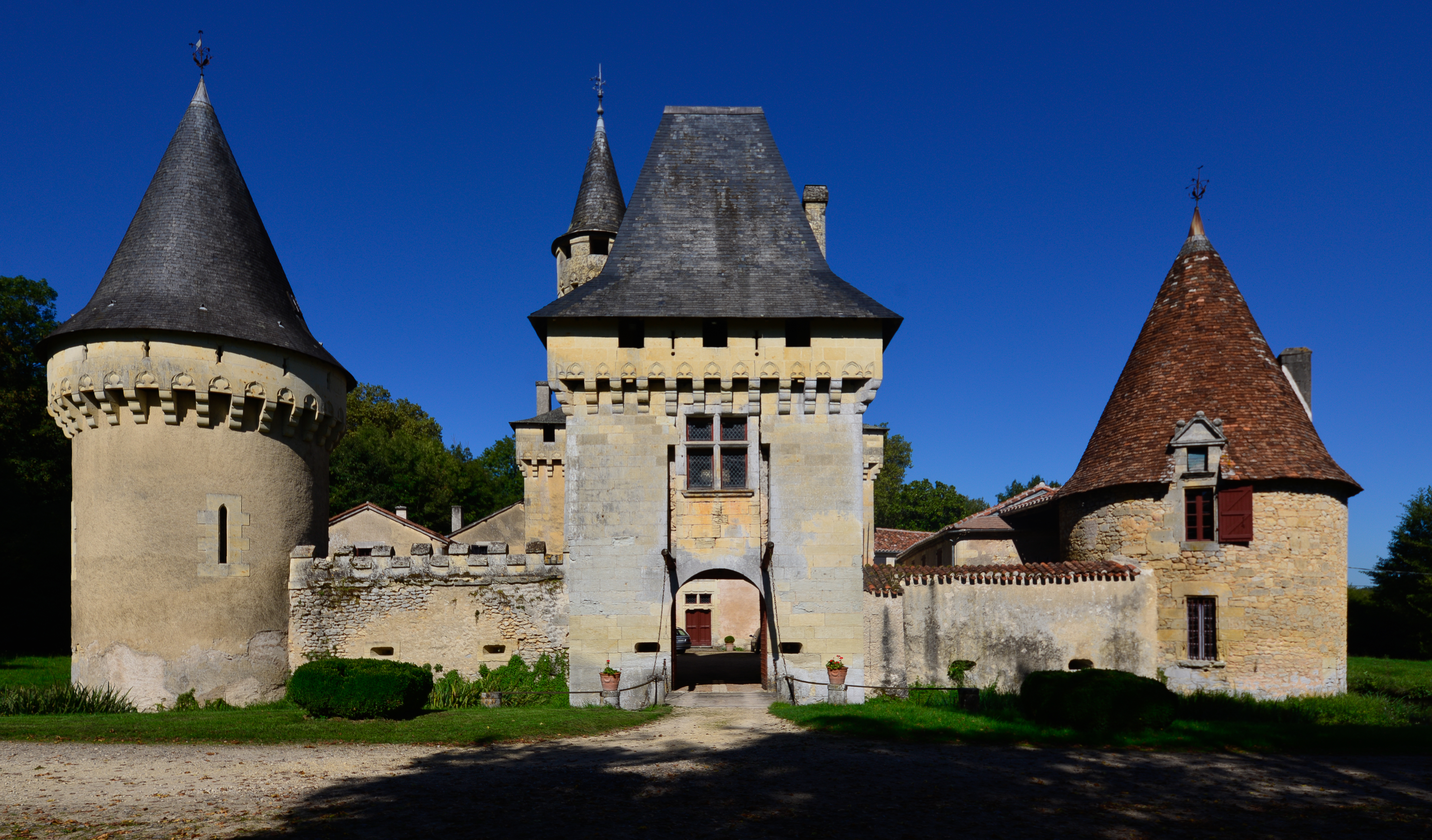 Château du Lieu-Dieu (Inscription) .